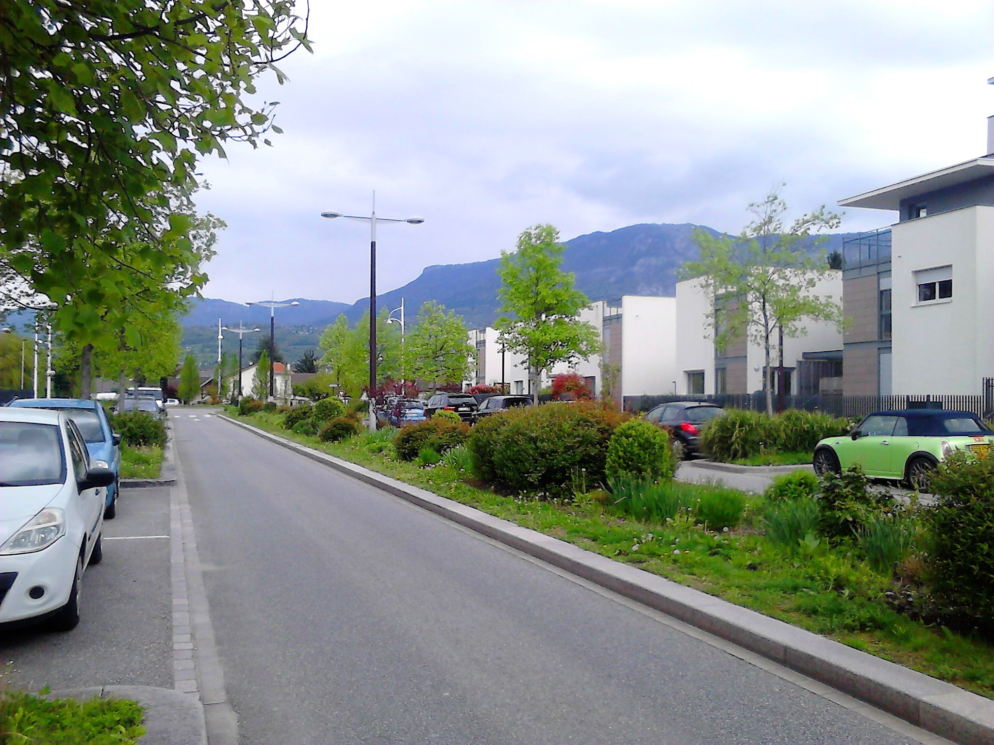 L'Allée Promenade des Bords du Lac accédant à l'esplanade du lac du Bourget à Aix-les-Bains.